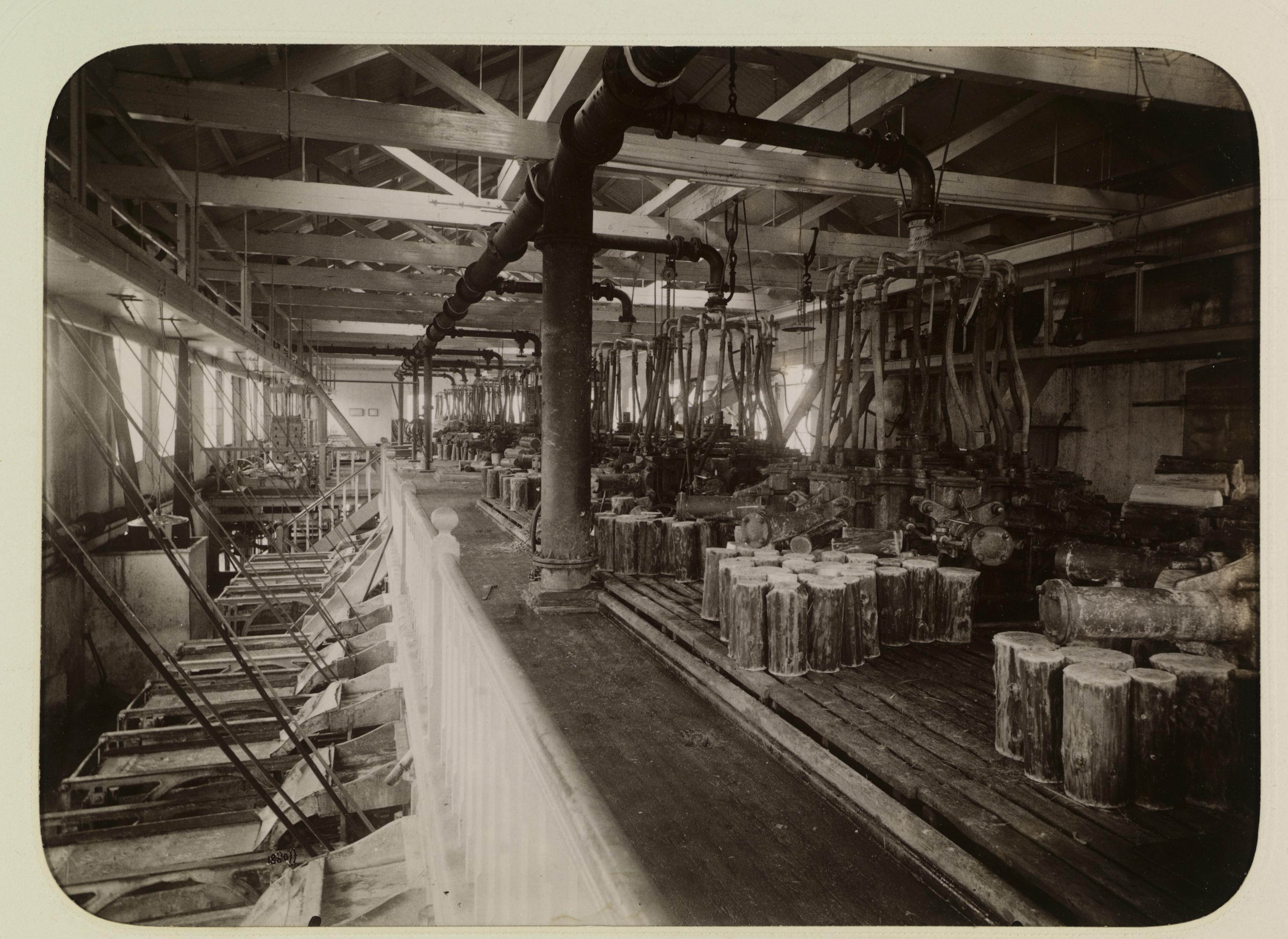 Treforedlingsindustri ved Skotfoss Bruk. Fra arkivet etter Union Co (PA-1422, serie Ua: Fotoalbum med 20 bilder, stk 1_7).